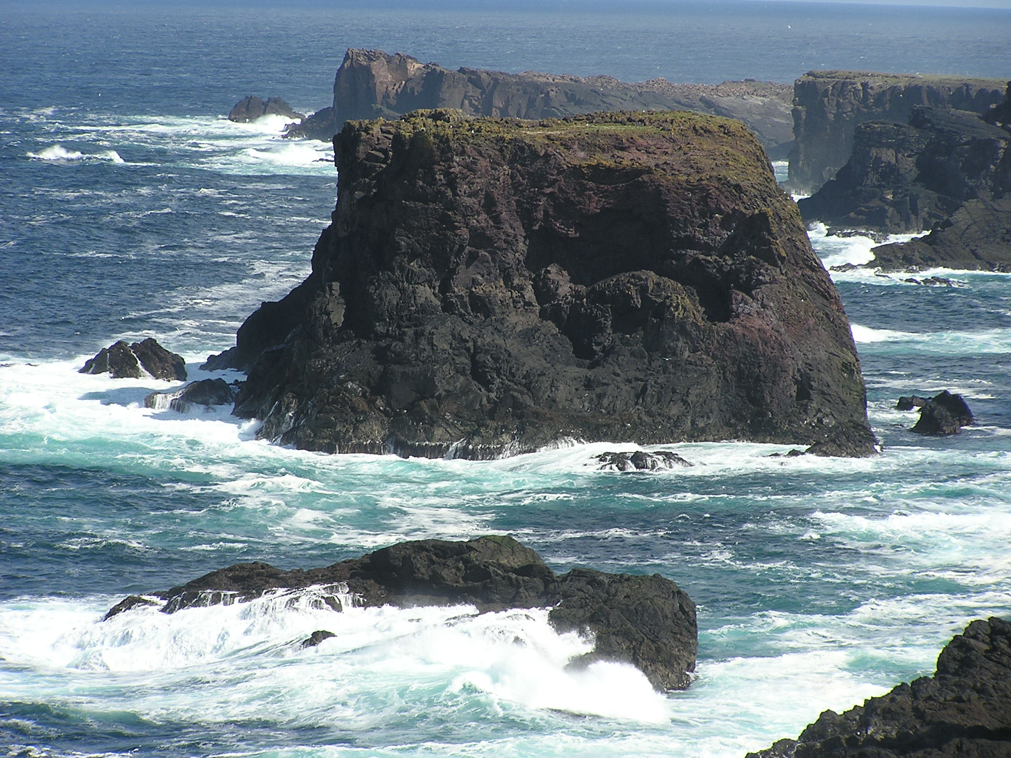 Klippenküste bei Eshaness, Mainland, Shetland